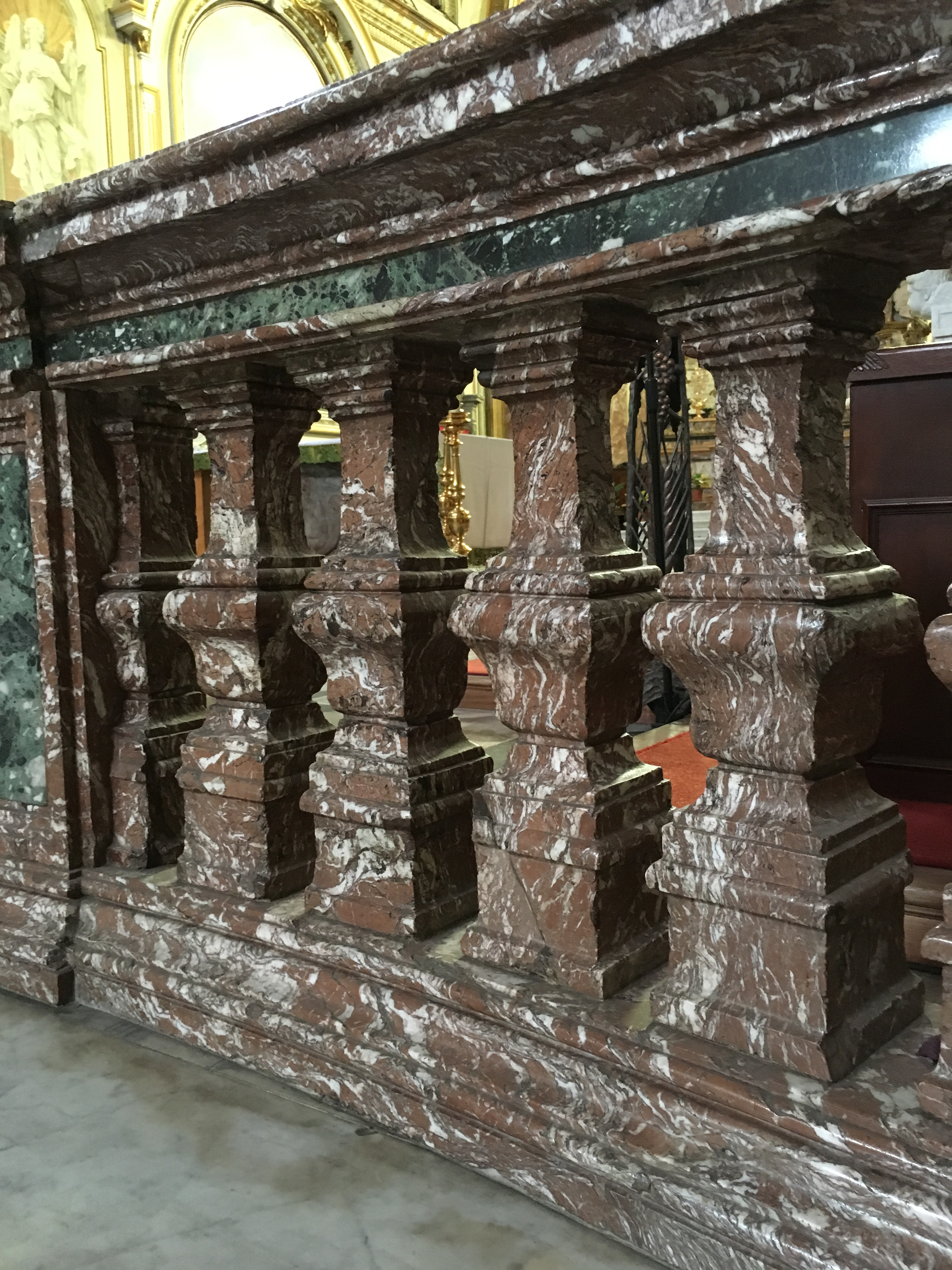 Balaustra marmo Cottanello. S.Maria degli angeli.Roma